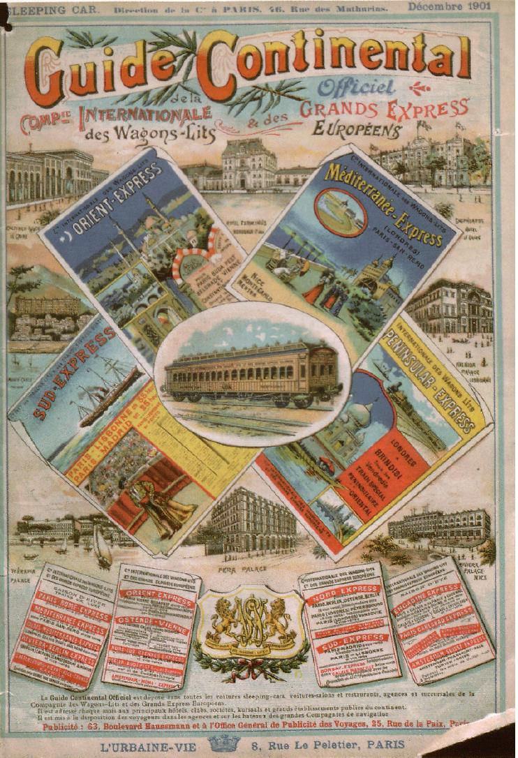 Titelblatt, CIWL-Guide 1901